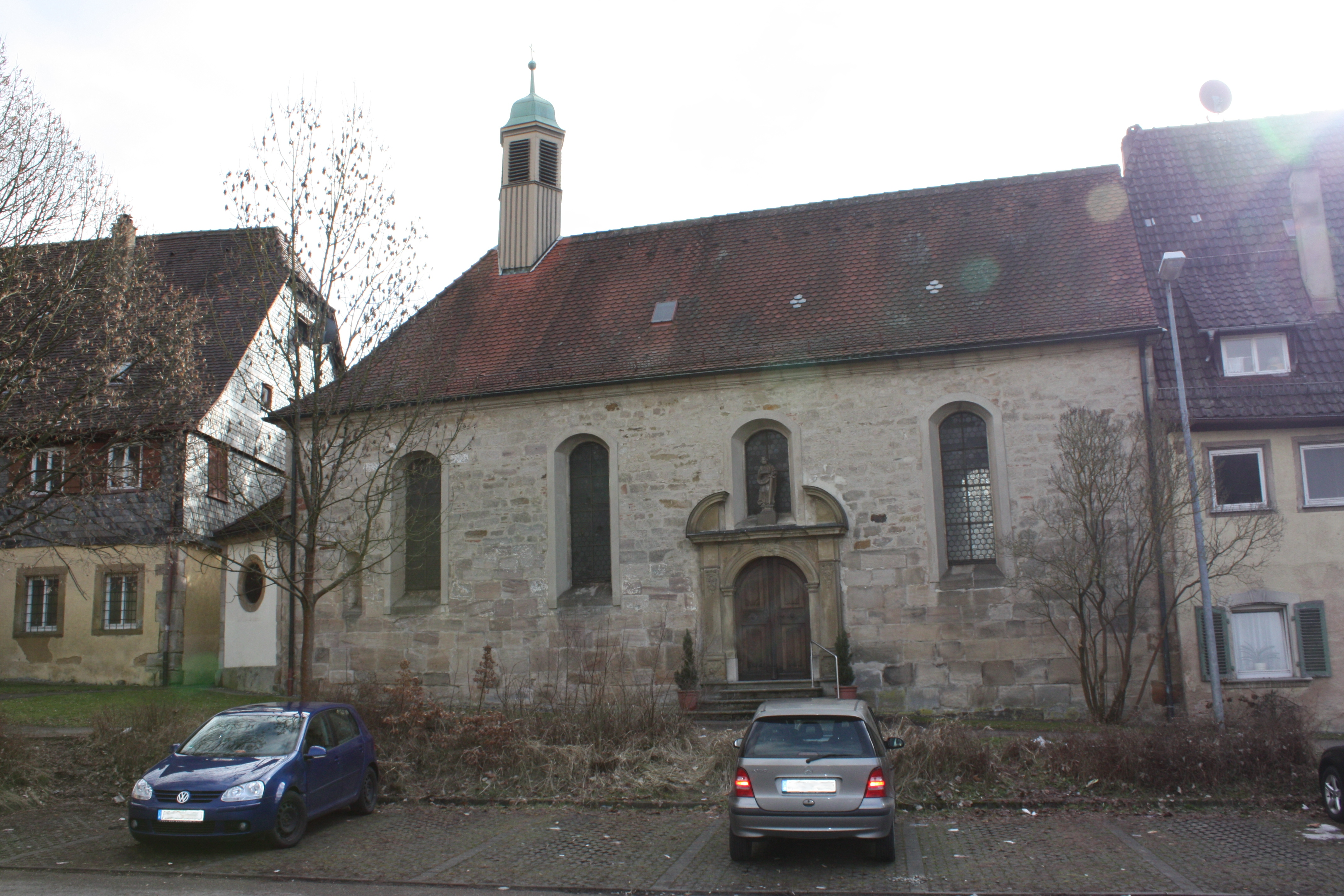 Siechenkapelle Sankt Katharina in Schwäbisch Gmünd. Nordfassade der Kapelle. Rechts im Bild das Hofmeistereigebäude, links das Spitalpfründehaus